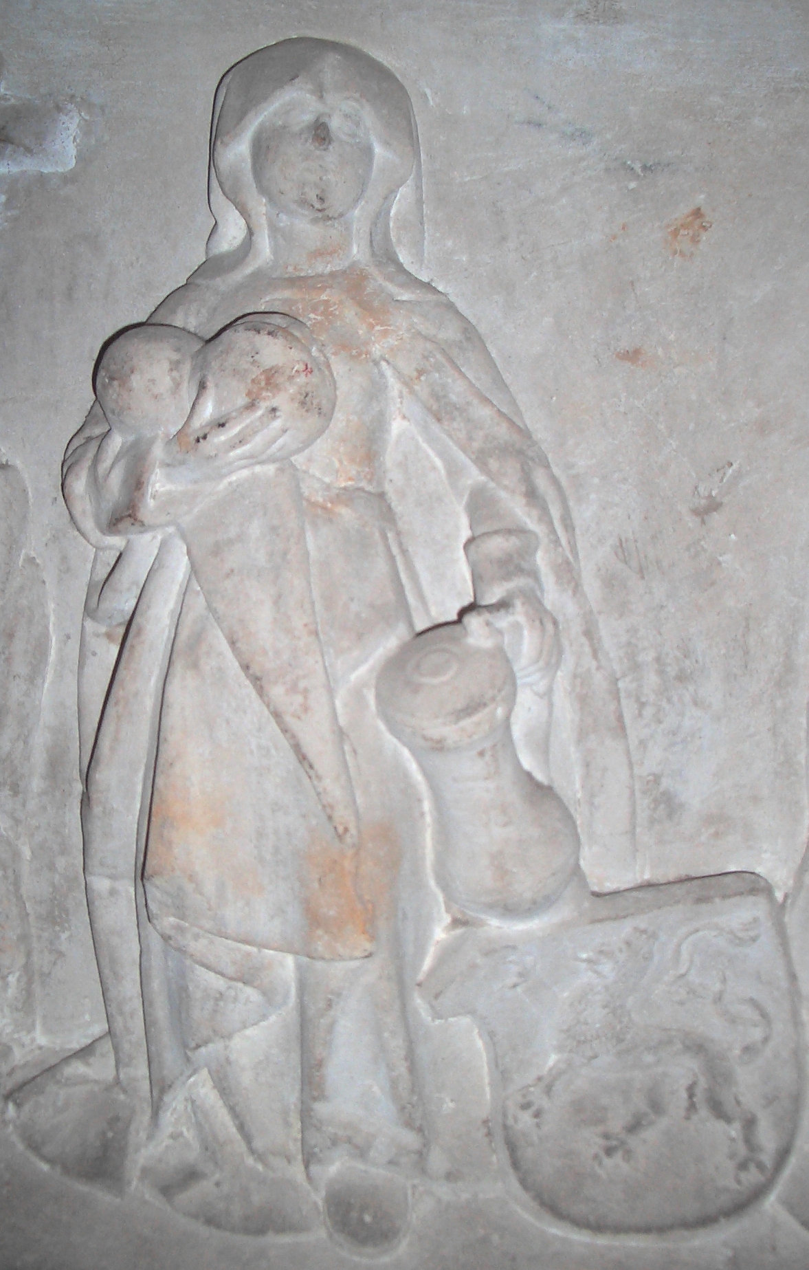 Darstellung der Elisabeth auf dem Grabmal des Gero, Stiftskirche Gernrode